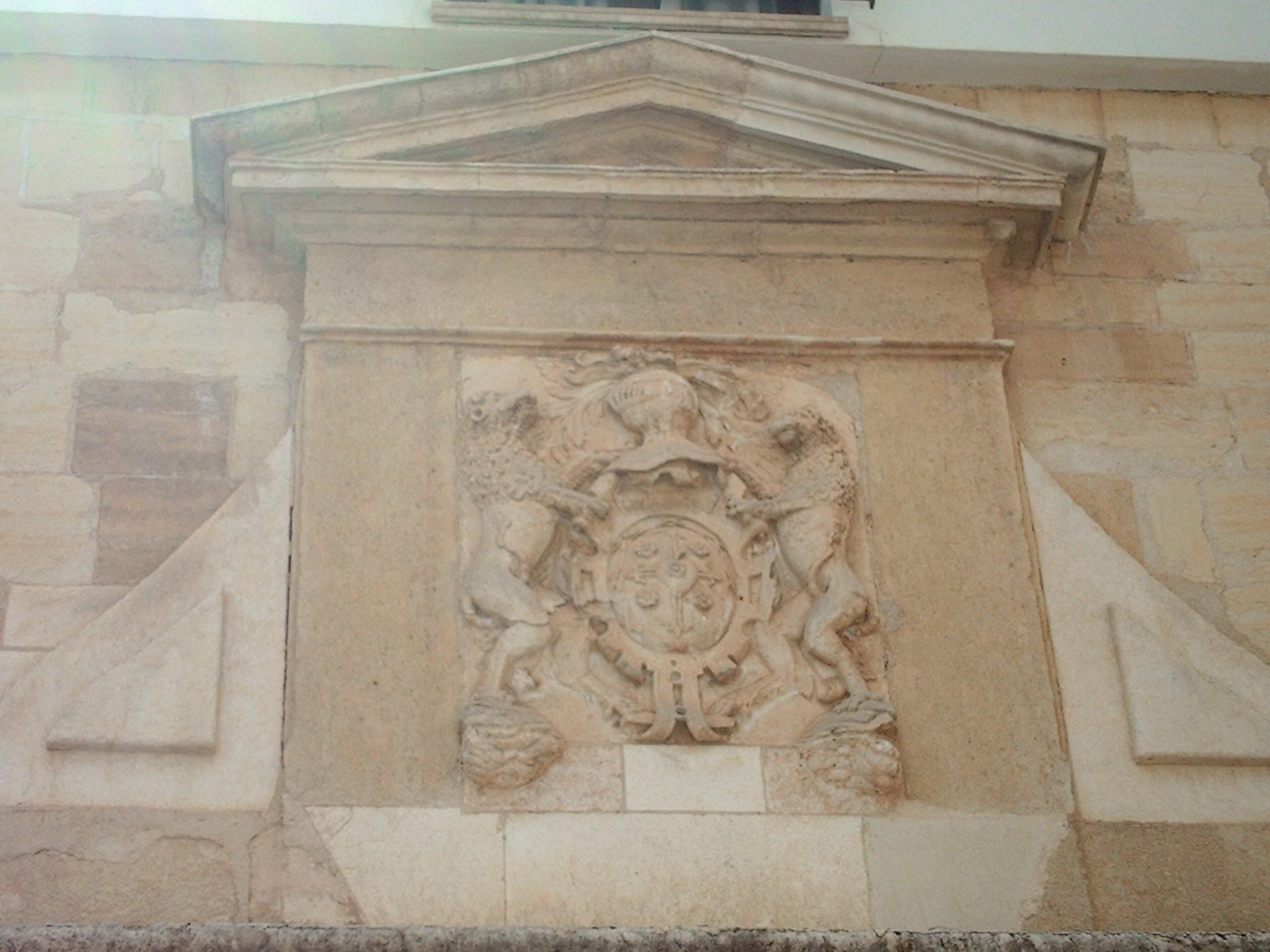 Escudo Nobiliario en la Calle del Pedregal de Villarrobledo